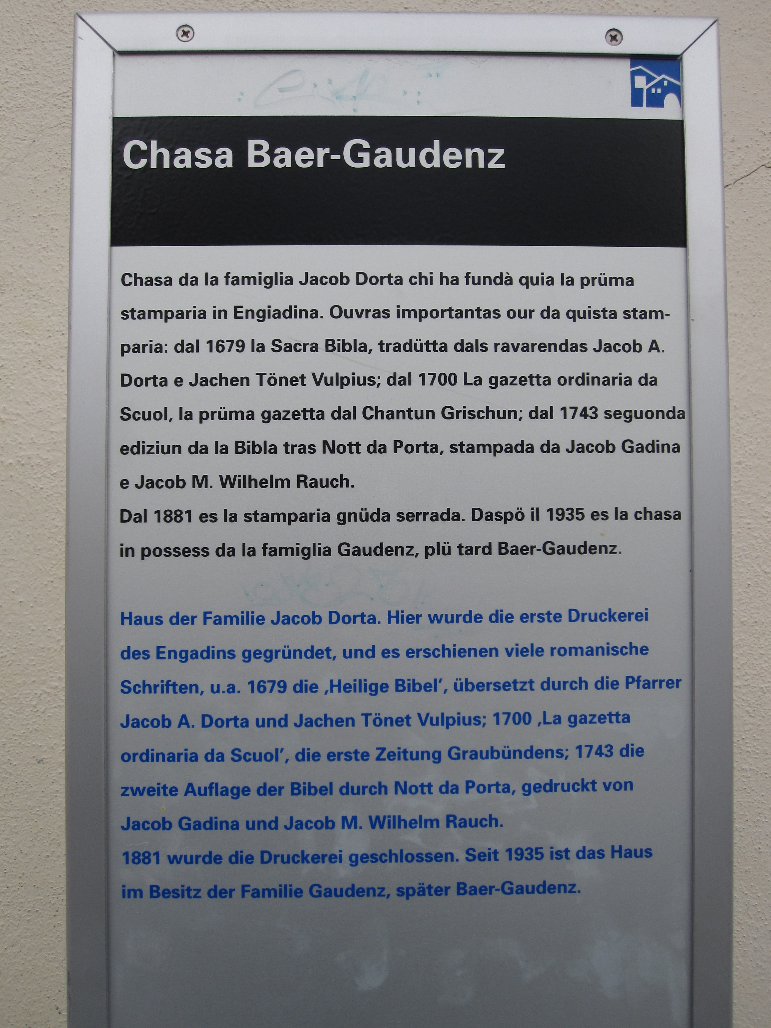 Informationstafel vor der Chasa Baer-Gaudenz in Scuol (Kanton Graubünden)